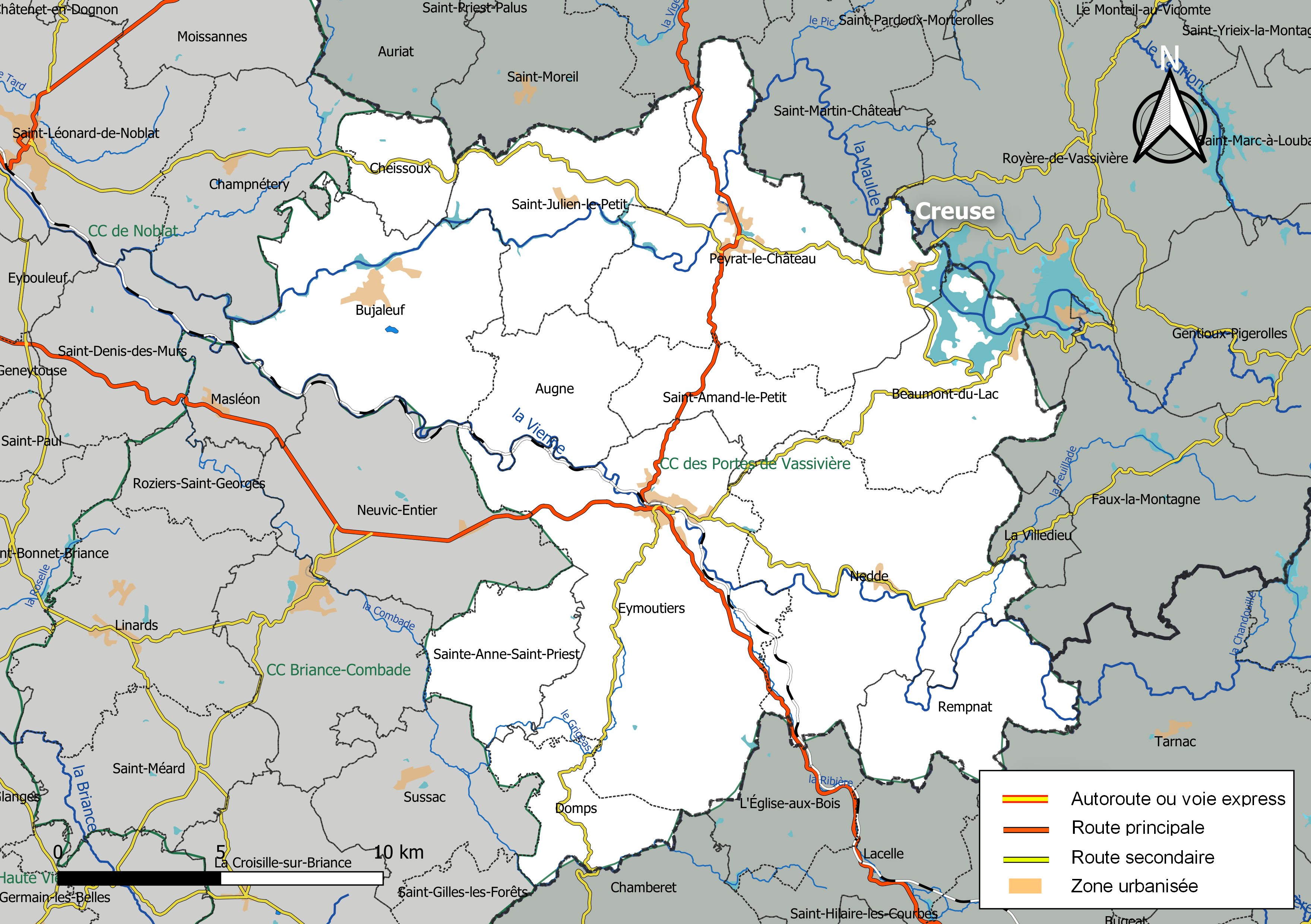 Carte géographique de la Communauté de communes des Portes de Vassivière, département de la Haute-Vienne, France. Composition au 1er janvier 2019.